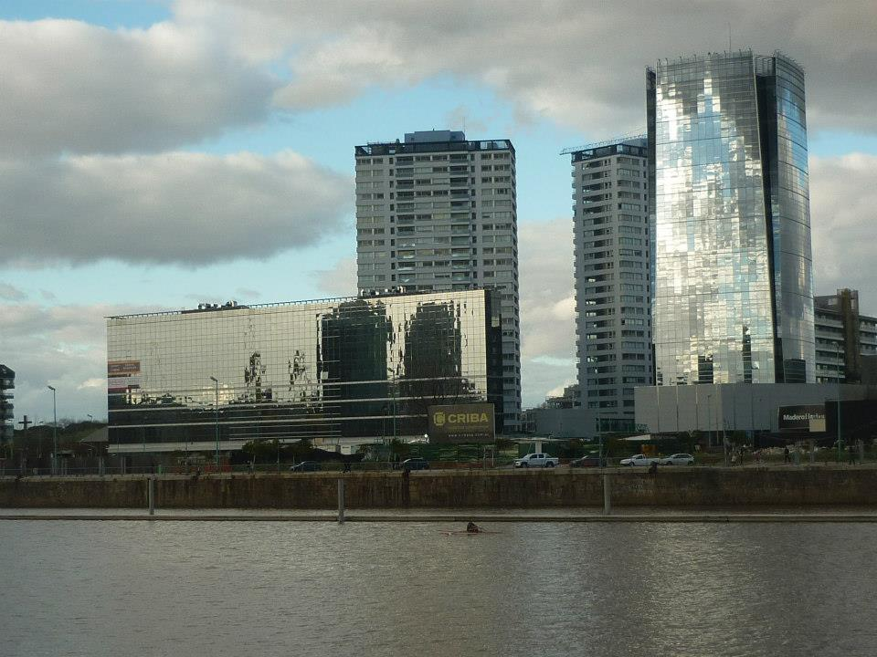 Zen City and Madero Harbour developments. Puerto Madero, Buenos Aires, Argentina.